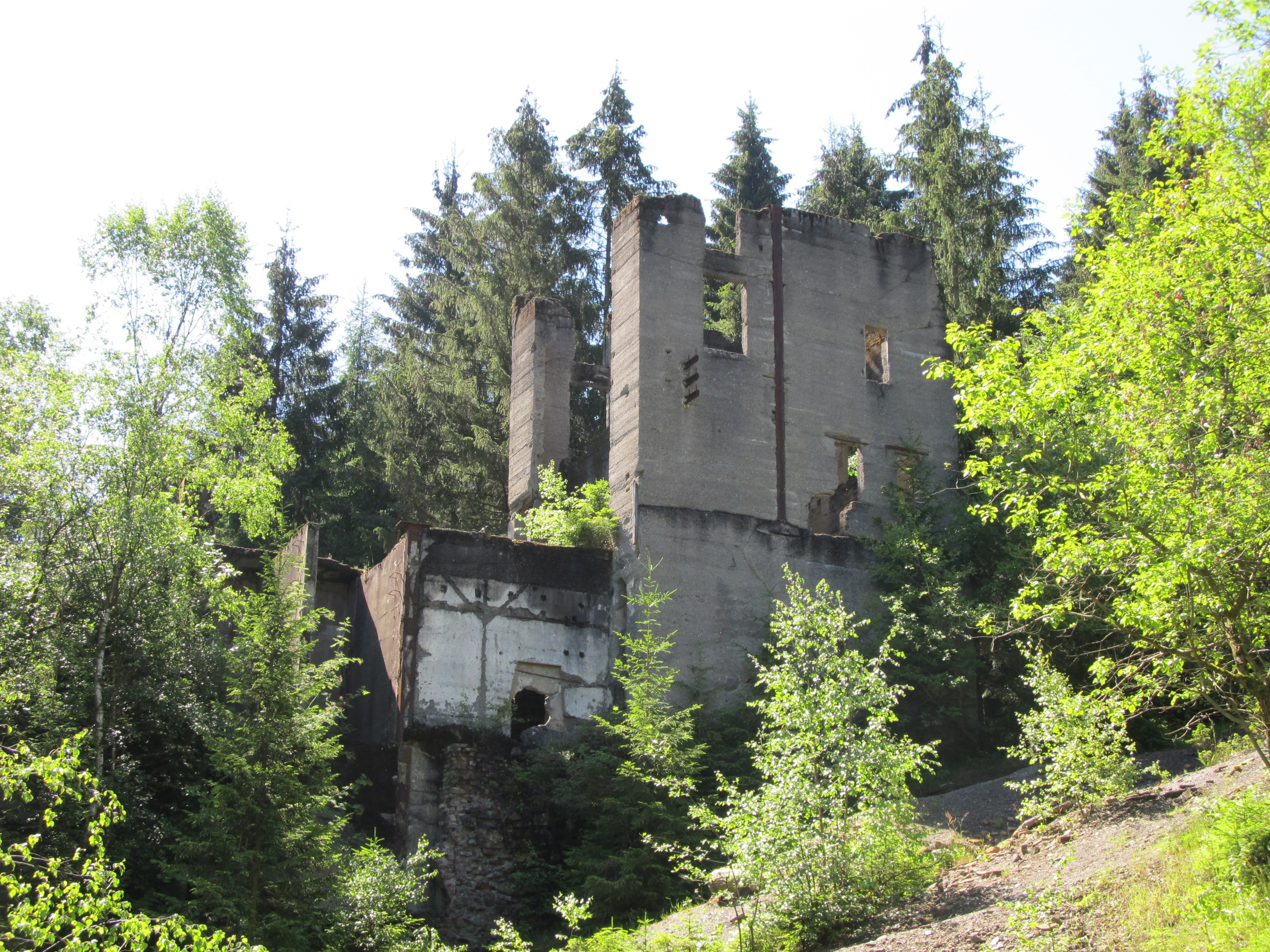 Ruine der Brecheranlage bei der Grube Peterszeche im Buchhellertal bei Burbach, Siegerland.